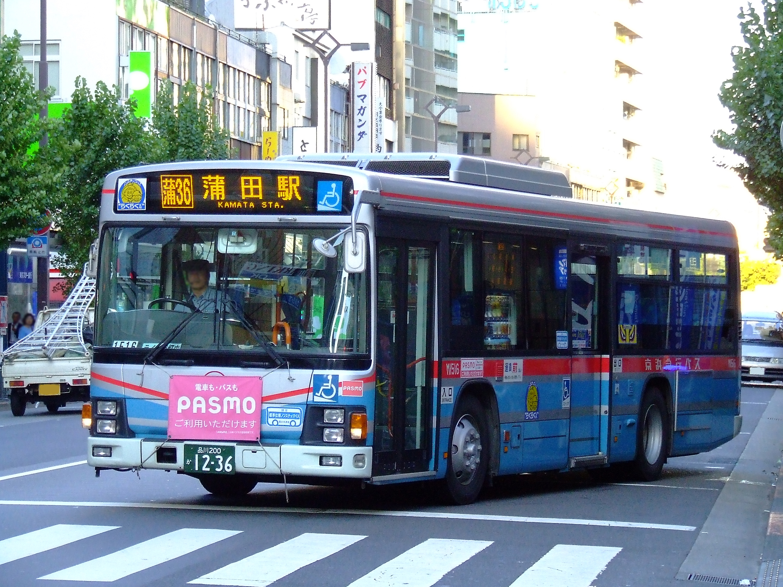 京浜急行バス大森営業所M1516号車 PJ-LV234L1 蒲田駅にて